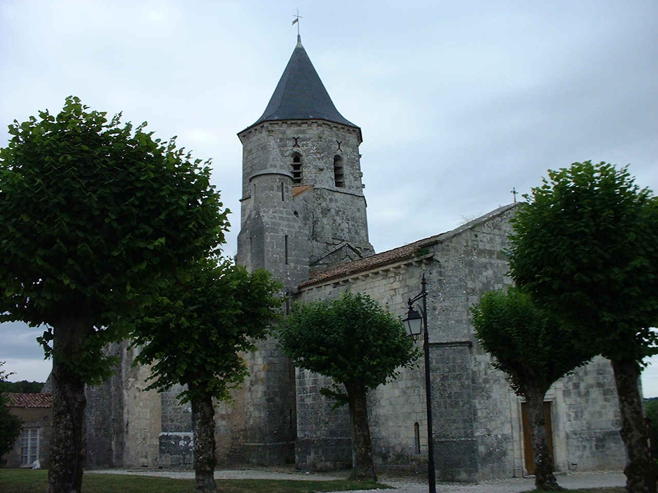 Eglise Saint-Martin d'Arces